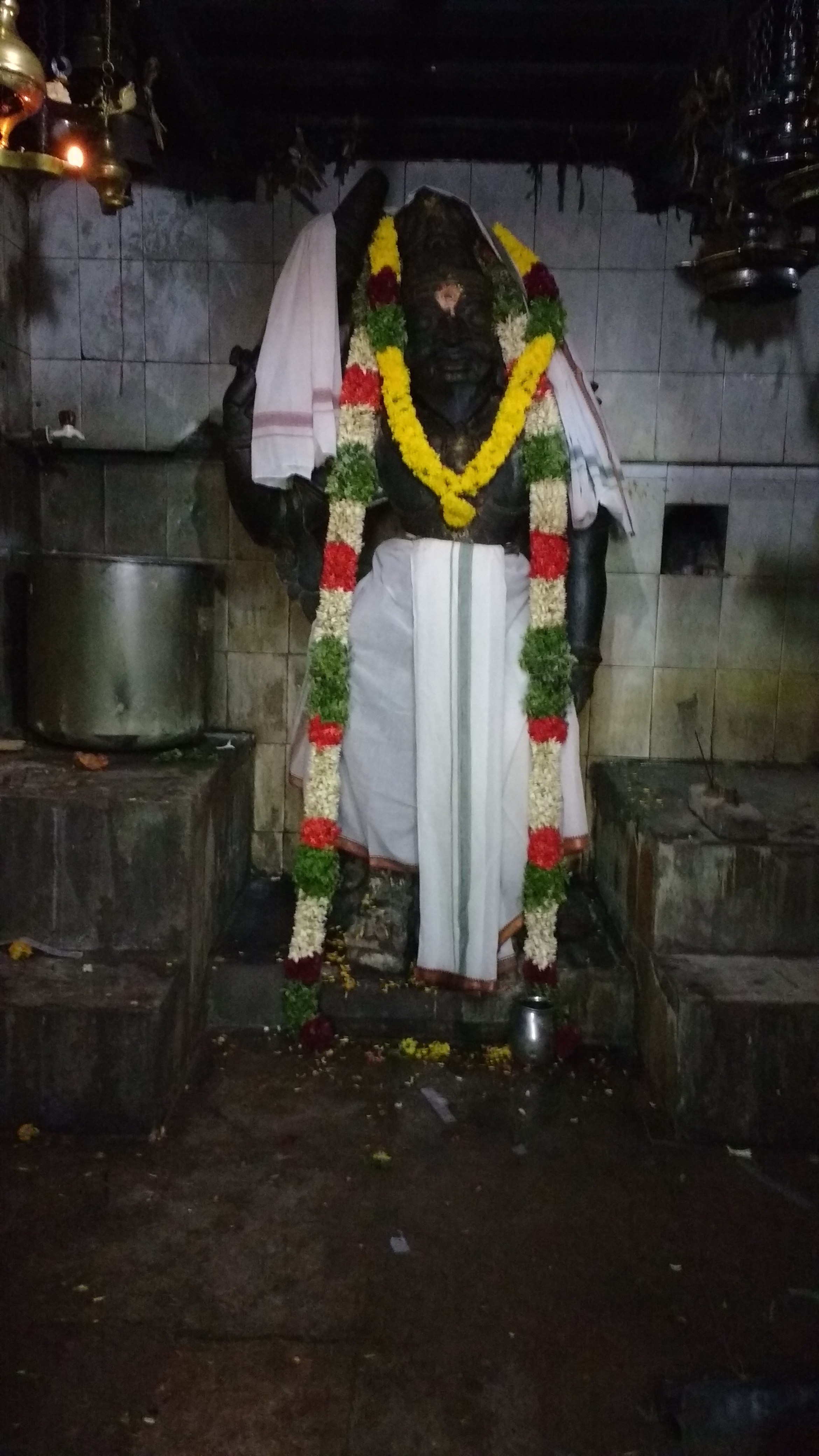 பொற்பனைக்கோட்டையின் மேற்கு பகுதியில் உள்ள முனீஸ்வரரின் சிலை